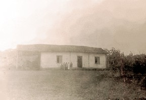 Casa de fazenda onde nasceu o jornalista anarquista Edgar Leuenroth em Mogi-Mirim.